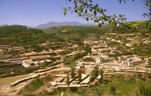 Panoramaaufnahme des Kumbum-Klosters (in Provinz Qinghai, differenzierende Bezeichnung "Taersi" (chin.))